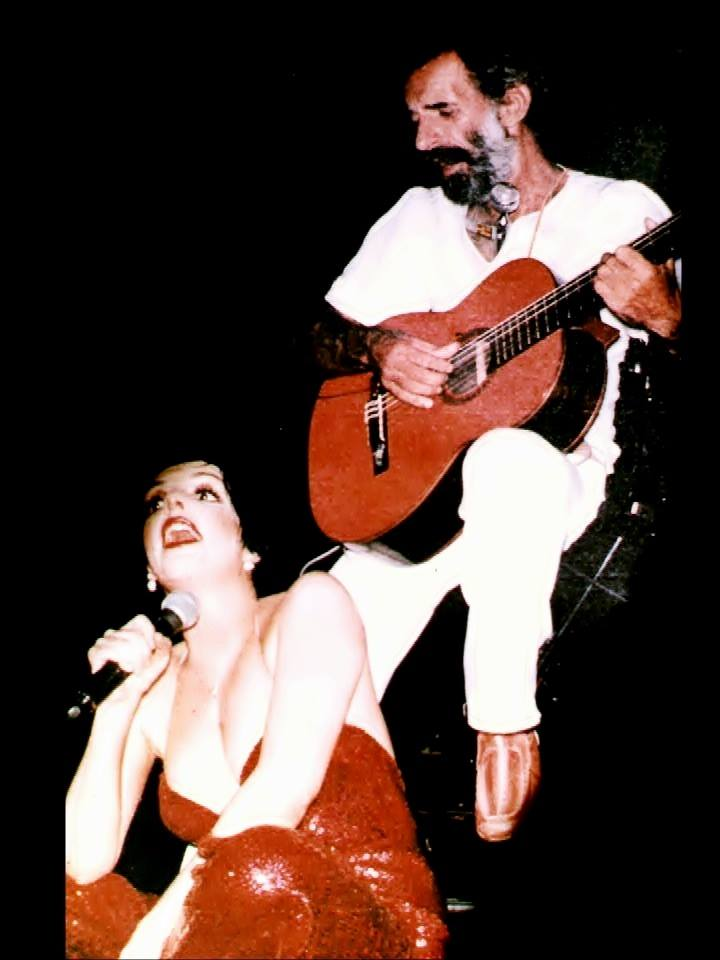 Português do Brasil: Luiz Henrique e Liza Minnelli, Rio de Janeiro, 1979.